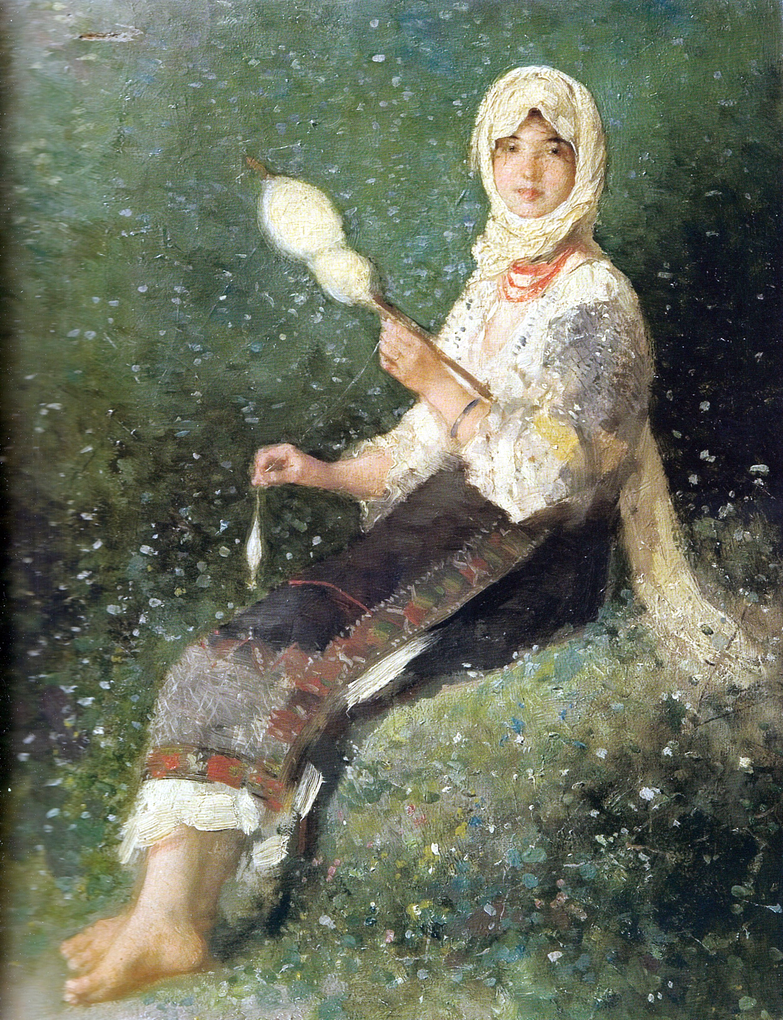 Țărancă torcând, ulei pe pânză - Galeria de Artă Românească a Muzeului Național de Artă al României.